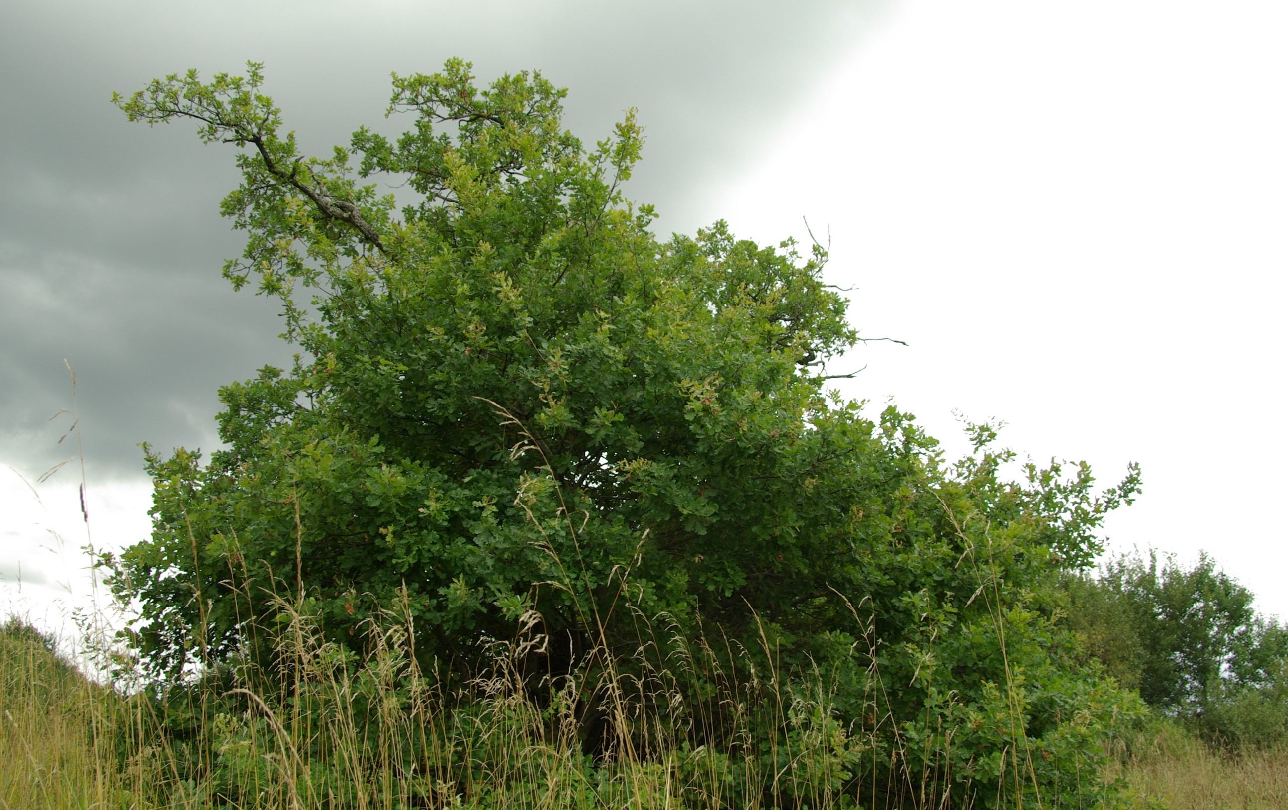 Asub umbes 15 km Tallinnast Tartu mnt ääres Rae vallas Aaviku külas